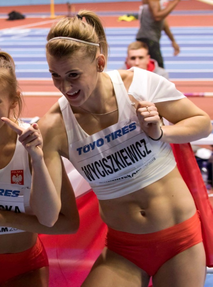 WK040206 pools 4x400m damesteam